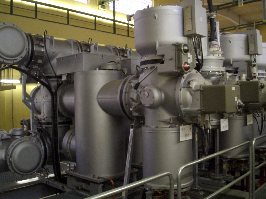 Umspannwerk Simmering, SF6-gasisolierte Schaltanlage für 110kV, Detailaufnahme. Bildmitte im vertikalen Zylinder: Leistungsschalter. Vorne: Abgangstrenner. Dahinter die beiden Sammelschienentrenner.